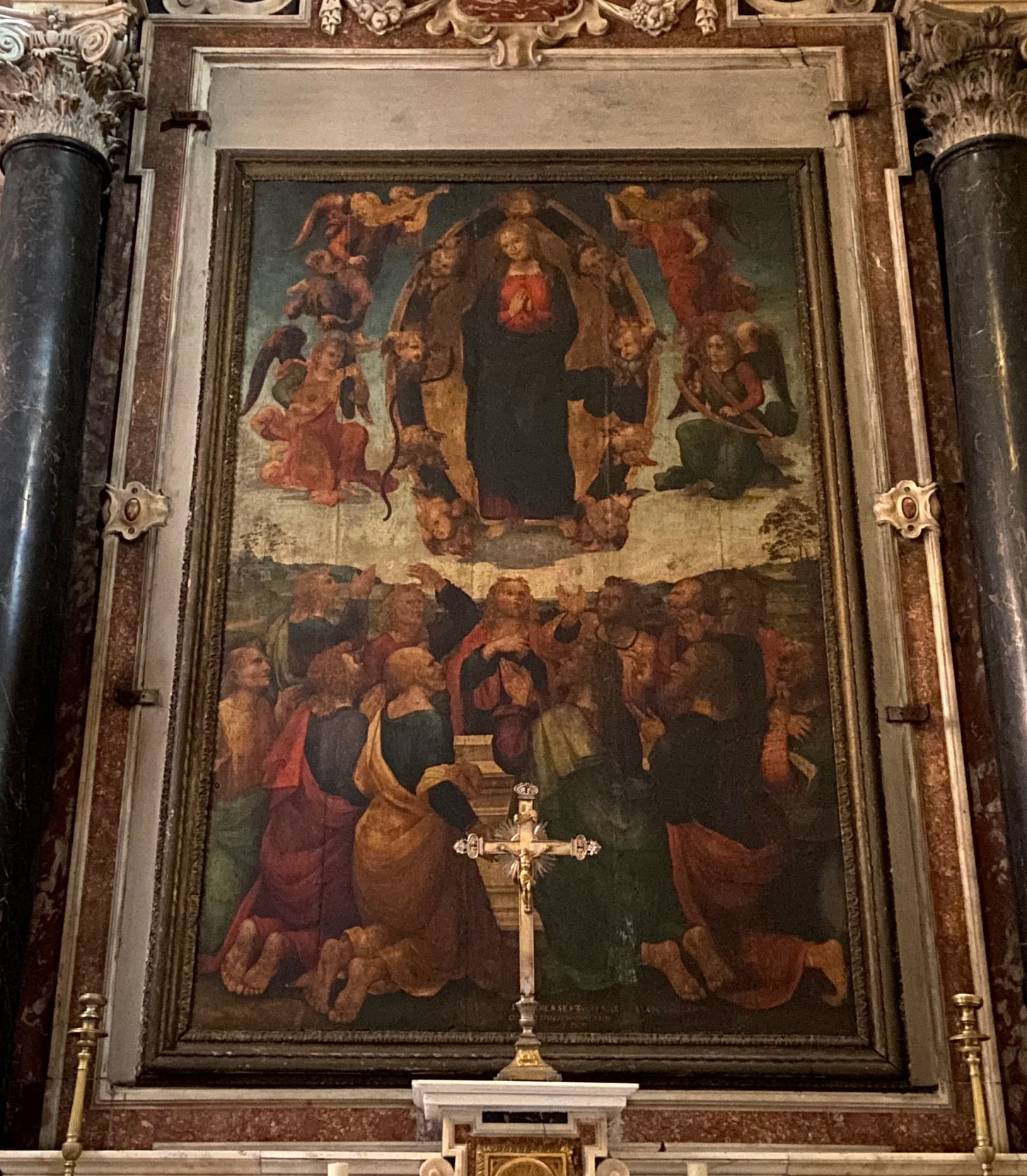 Corsu: Pittura nant'à legnu chì si trova in a catedrale Santa Maria Assunta in Bastia, in a citatella. L'opera hè di Leonoro dell'Aquila, pittore ligure (1512).